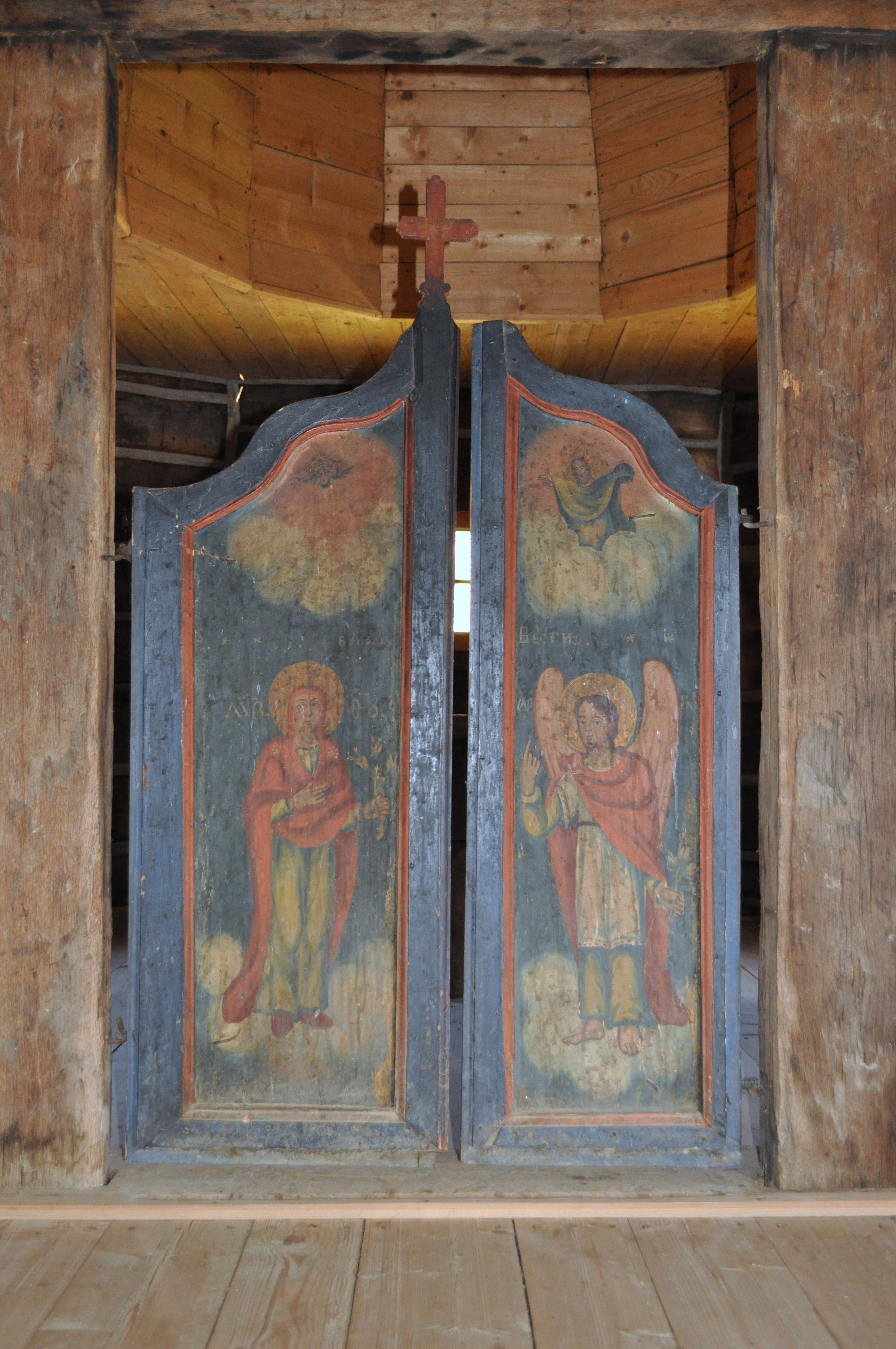 Biserica de lemn "Întâmpinarea Domnului", sat GROŞII NOI; comuna BÂRZAVA